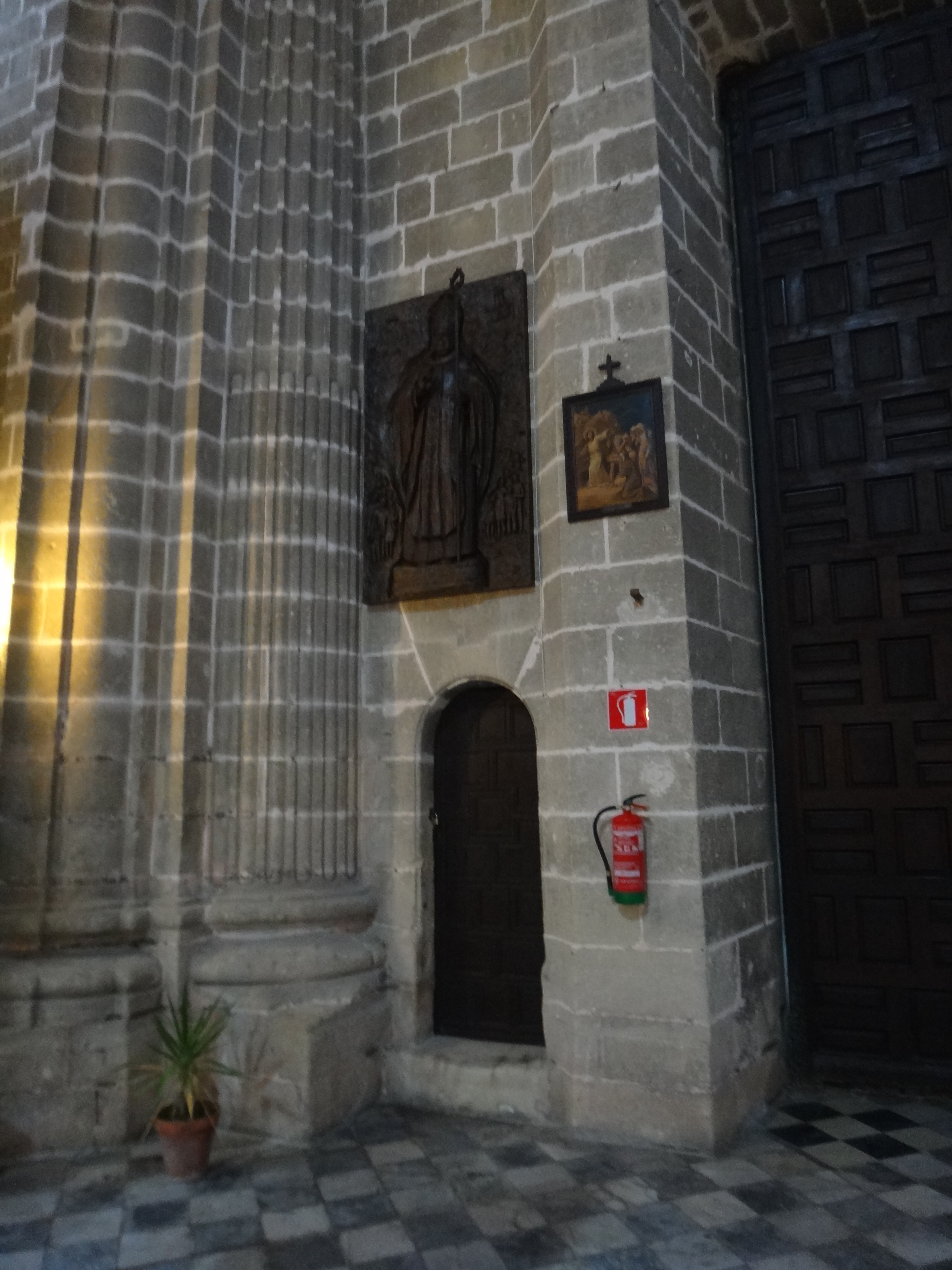 Homenaje al primer obispo de Jerez